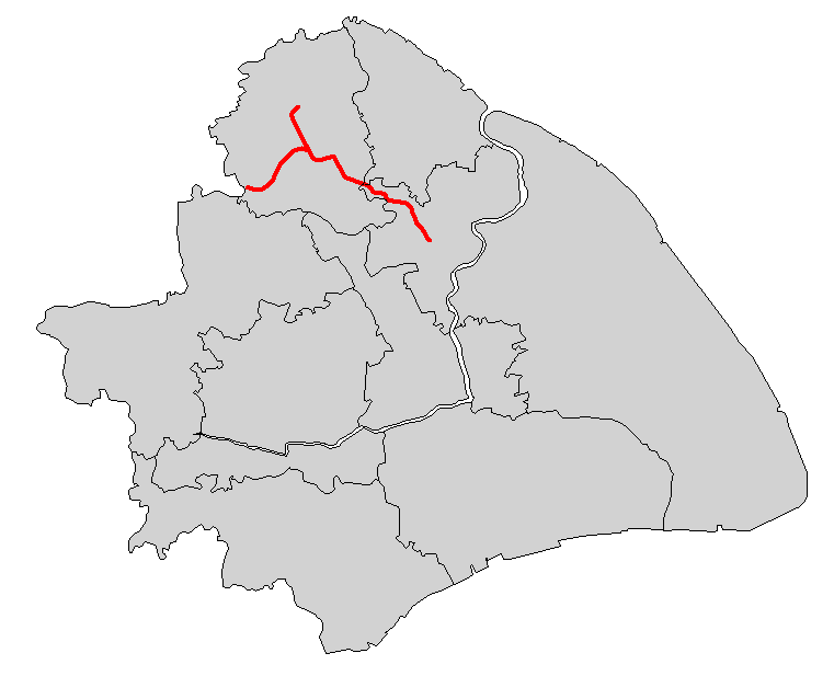 上海轨道交通11号线简图 本地图的底图不表示上海市全部所辖区域 因版面关系，上海市所辖之崇明岛、长兴岛等与本线路无关的离岛未在本图中表示。